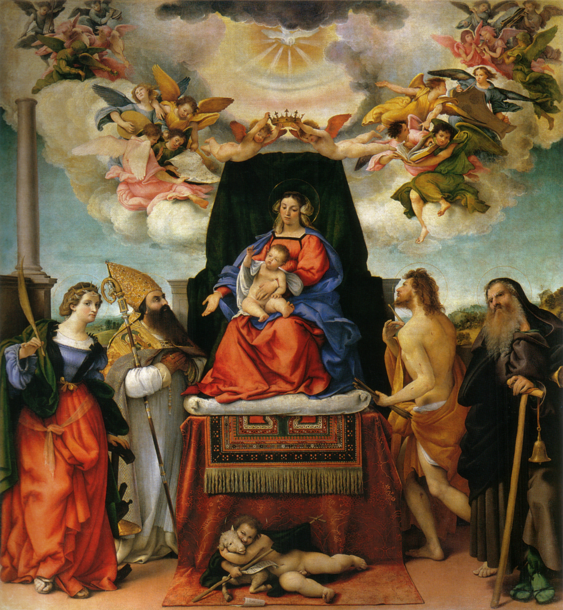 links: Hl. Katharina von Alexandrien, Hl. Augustinus, rechts: Hl. Sebastian, Hl. Antonius Abbate